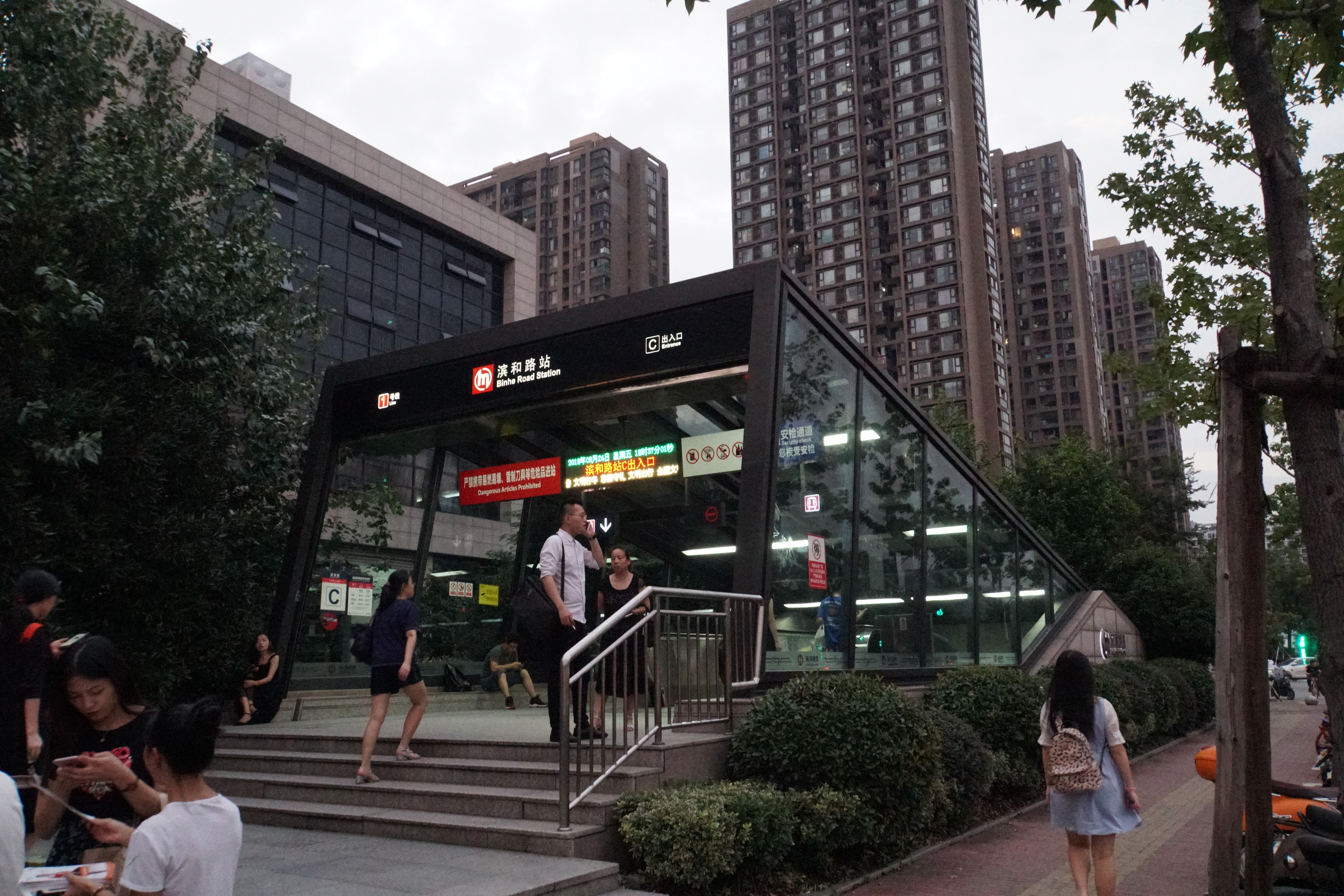 滨和路站C出入口